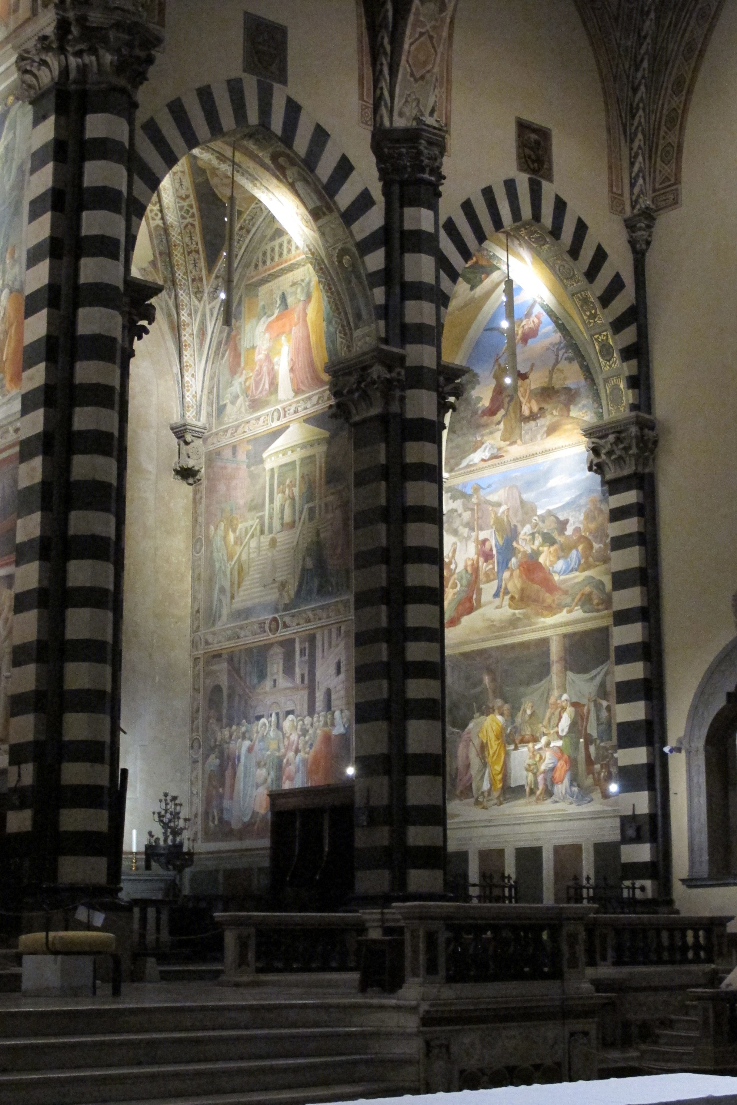 Duomo di Prato